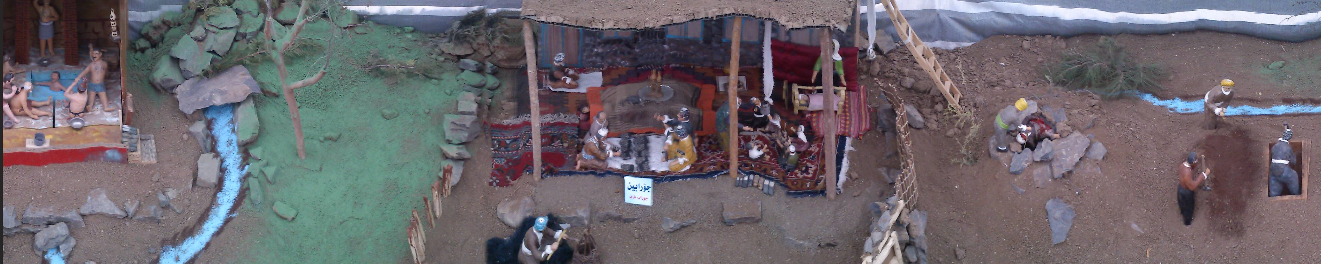 گوشه ی از آثار عثمان رحمان زاده